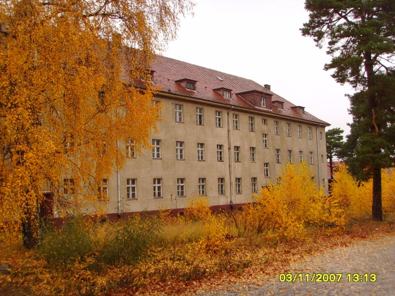 Budynek koszarowy 2 batalionu rozpoznawczego z Gubina (10 lat po rozwiazaniu jednostki)